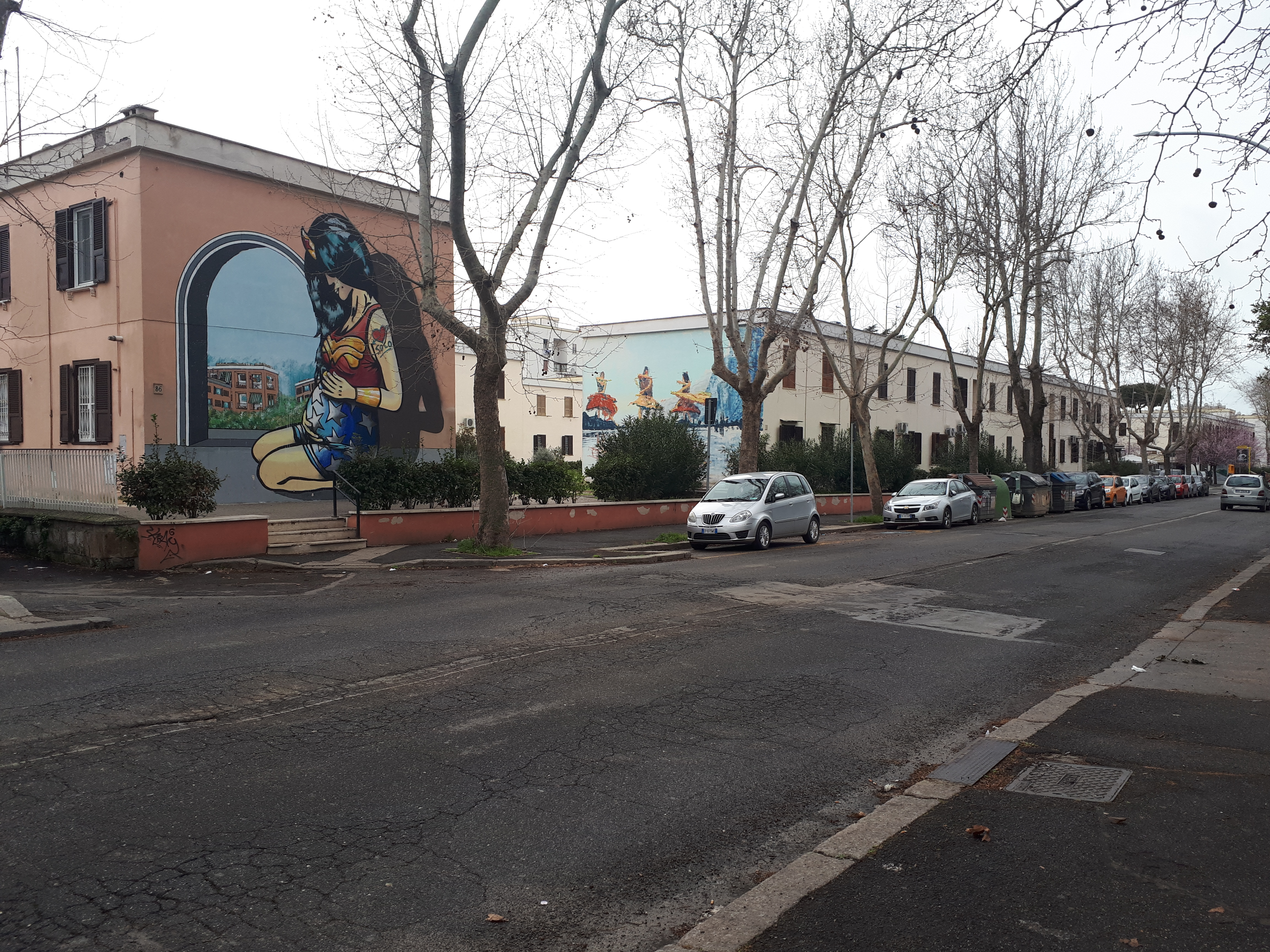 Case popolari quartiere Primavalle, Roma, con murales